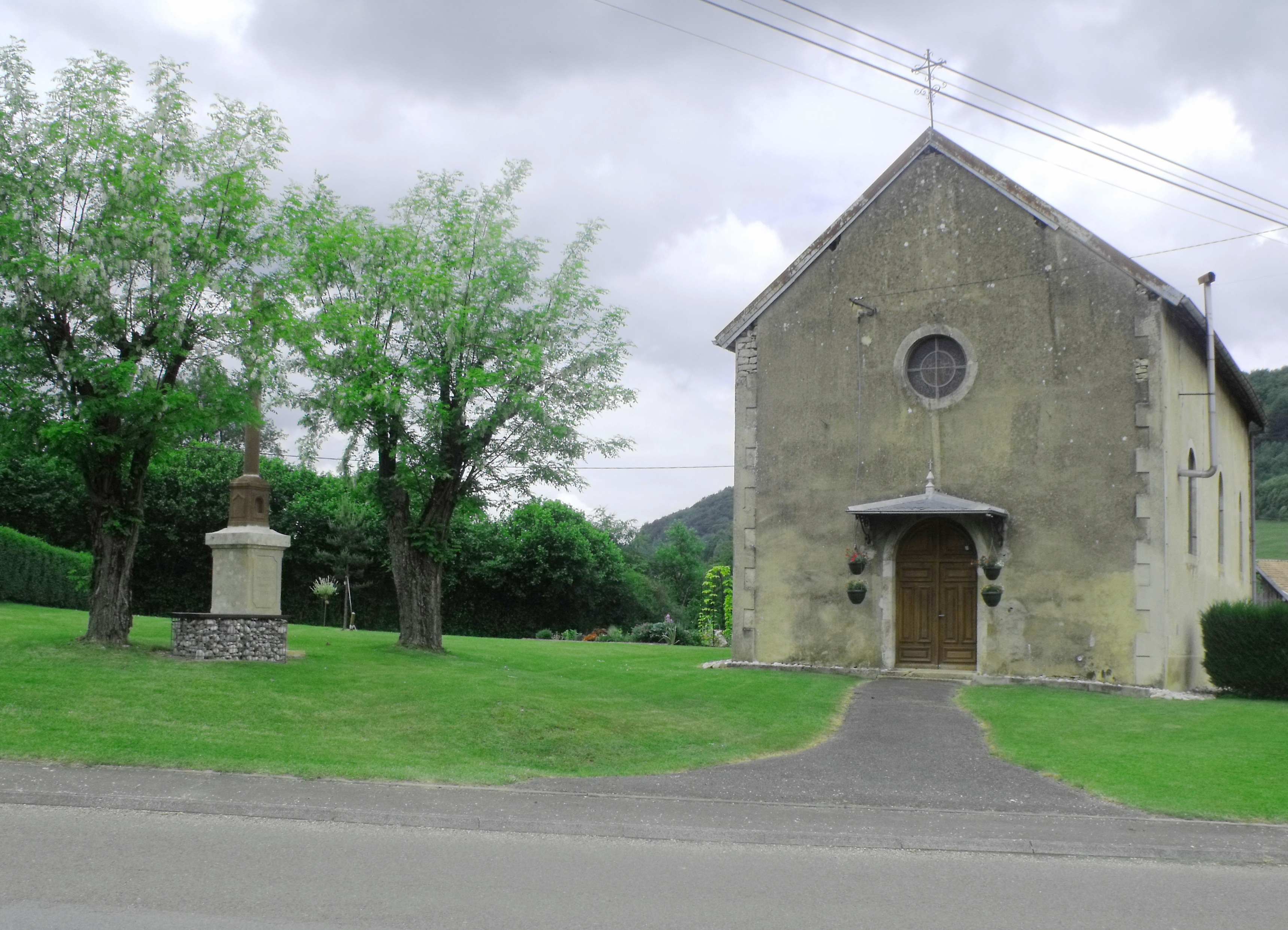 Chapelle à Hyémondans, Doubs, France